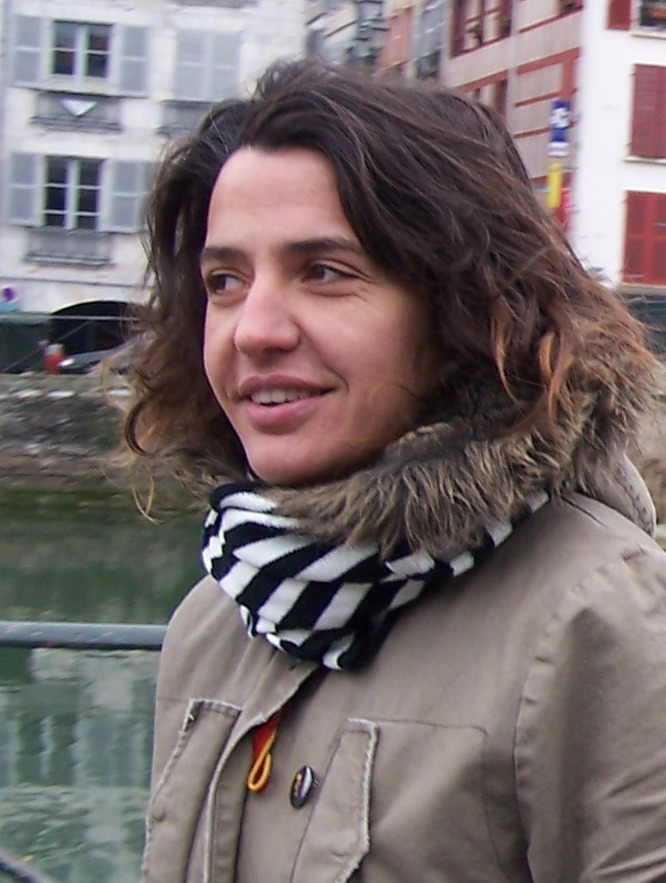 Anari Baionan